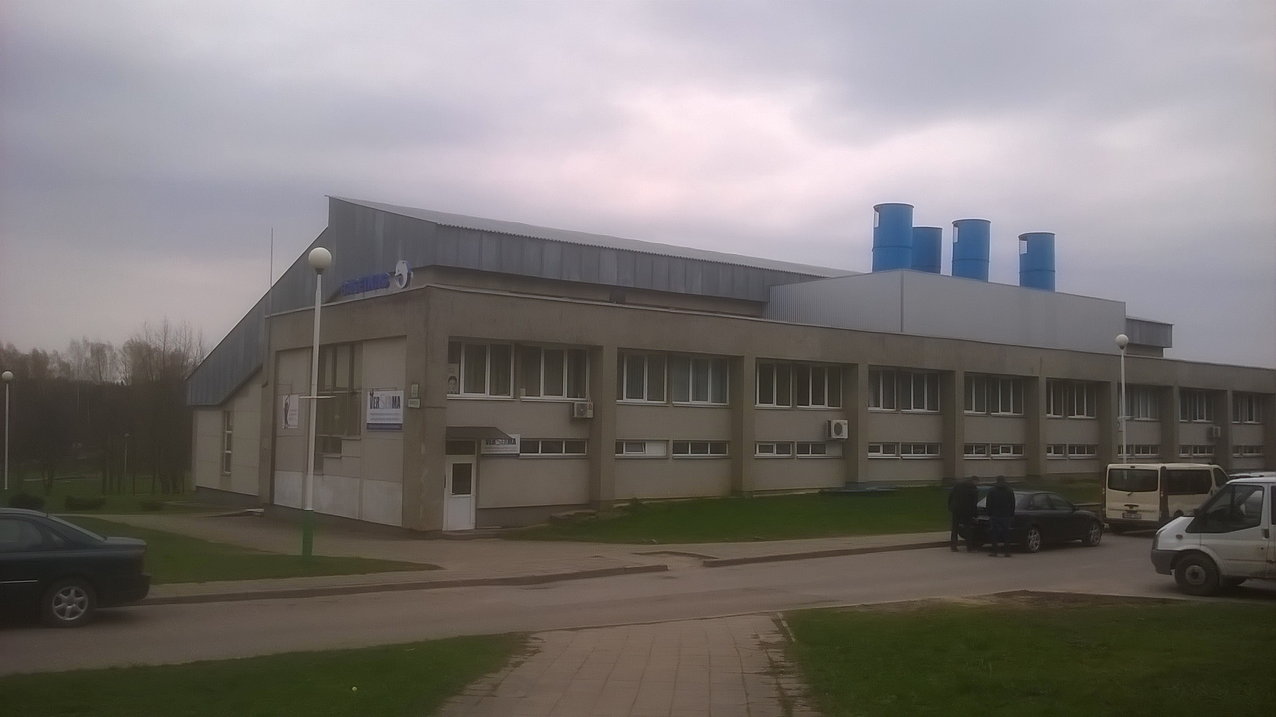 50-метровый плавательный бассейн в Электренай, по адресу ул. Драугистес, 20.